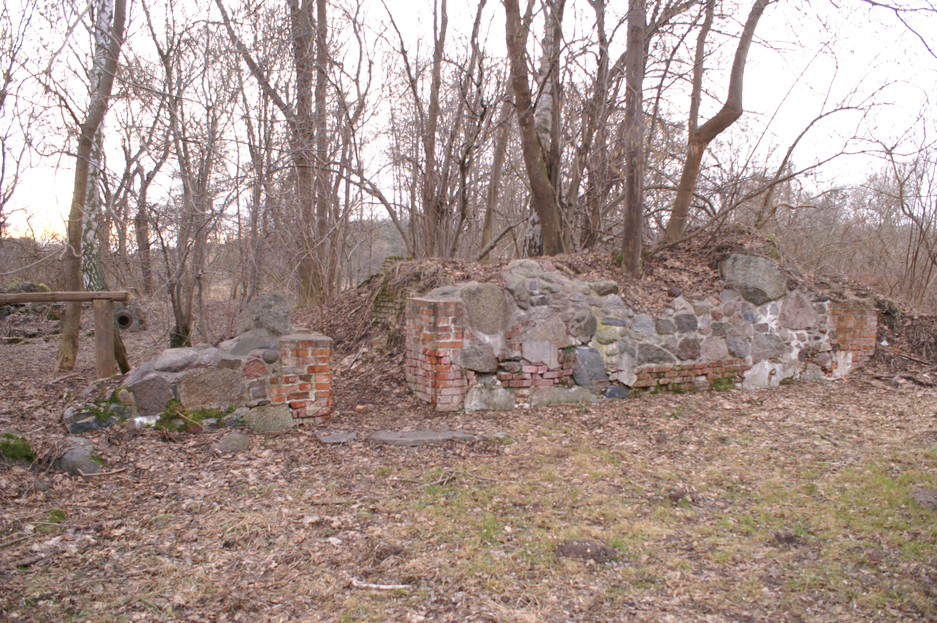 Neubrandenburg, Ruine der Krappmühle